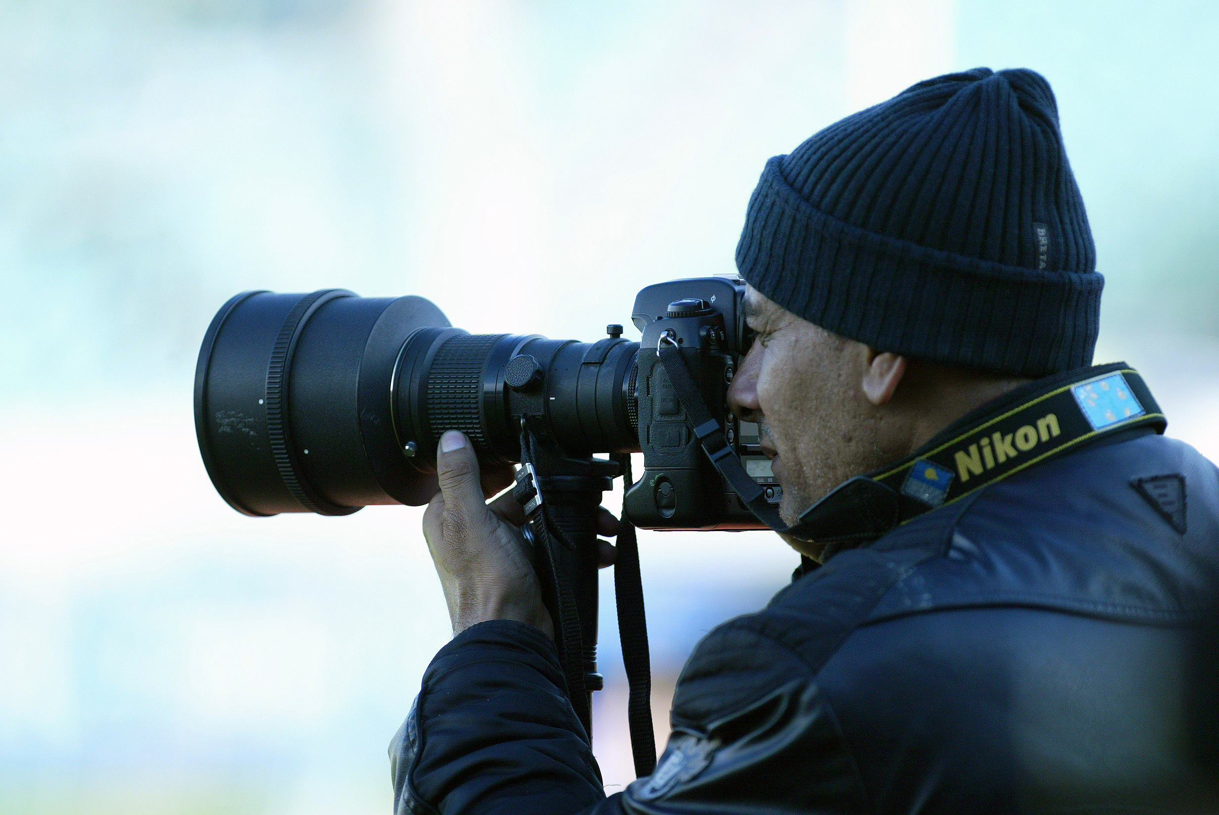 Photographe lors du match opposant le Raja de Casablanca au Mouloudia d'Oujda